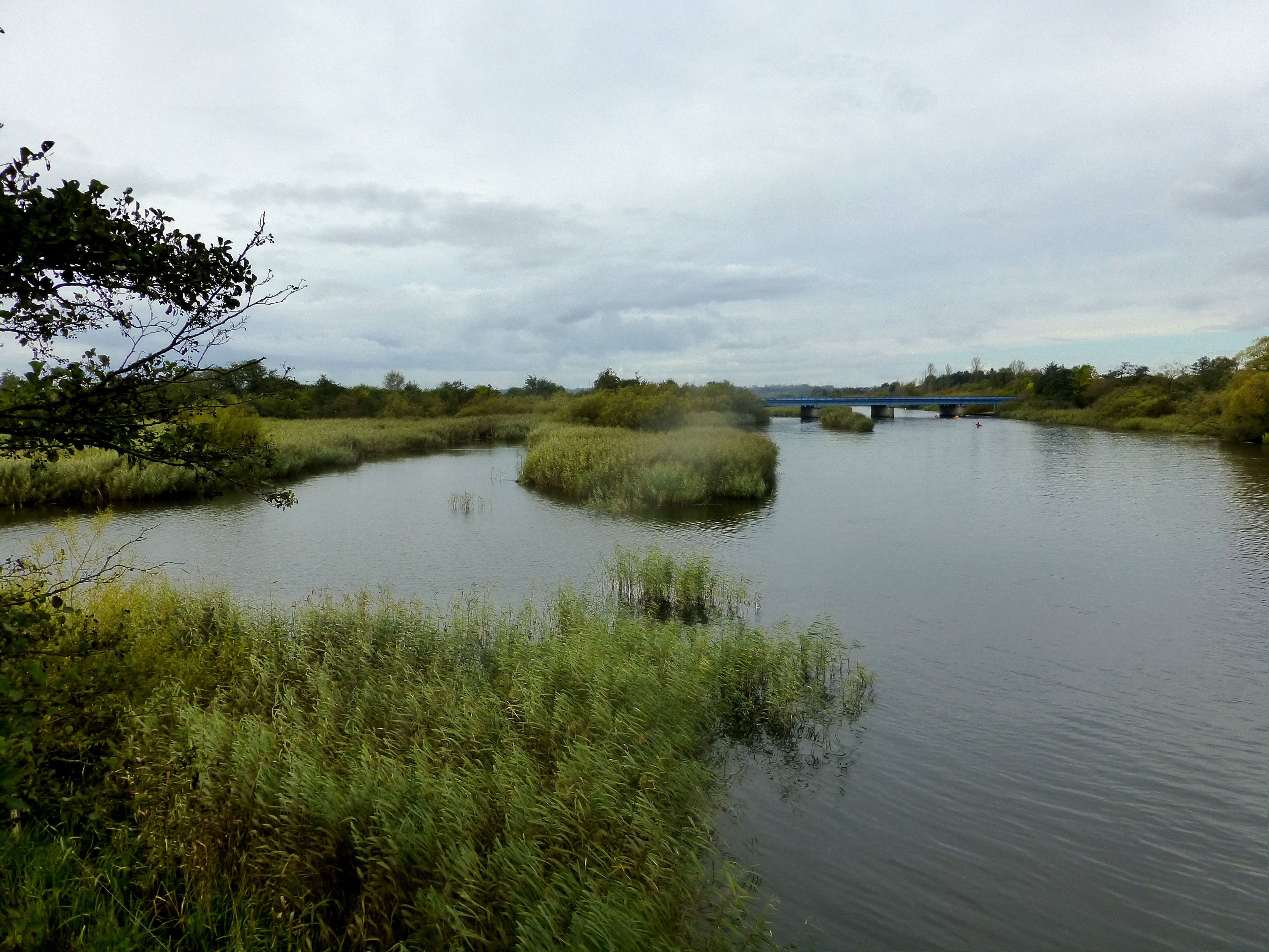 Gudenåen ved Randers set mod vest, fra den gamle jernbanebro, med den nye i baggrunden.